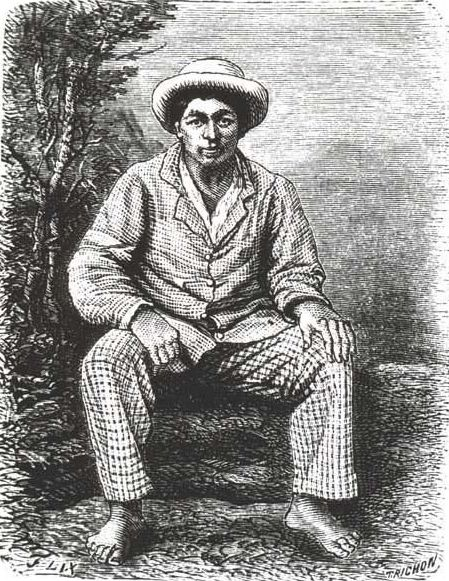 Un roto en Chile ilustrado : guia descriptiva del territorio de Chile, de las capitales de Provincia, de los puertos principales / por Recaredo S. Tornero.Valparaiso : Libr. i ajencias del Mercurio, 1872 (Paris : Imprenta Hispano-Americana de Rouge Dunan i Fresne) ix, 495 páginas, [9] hojas de láminas